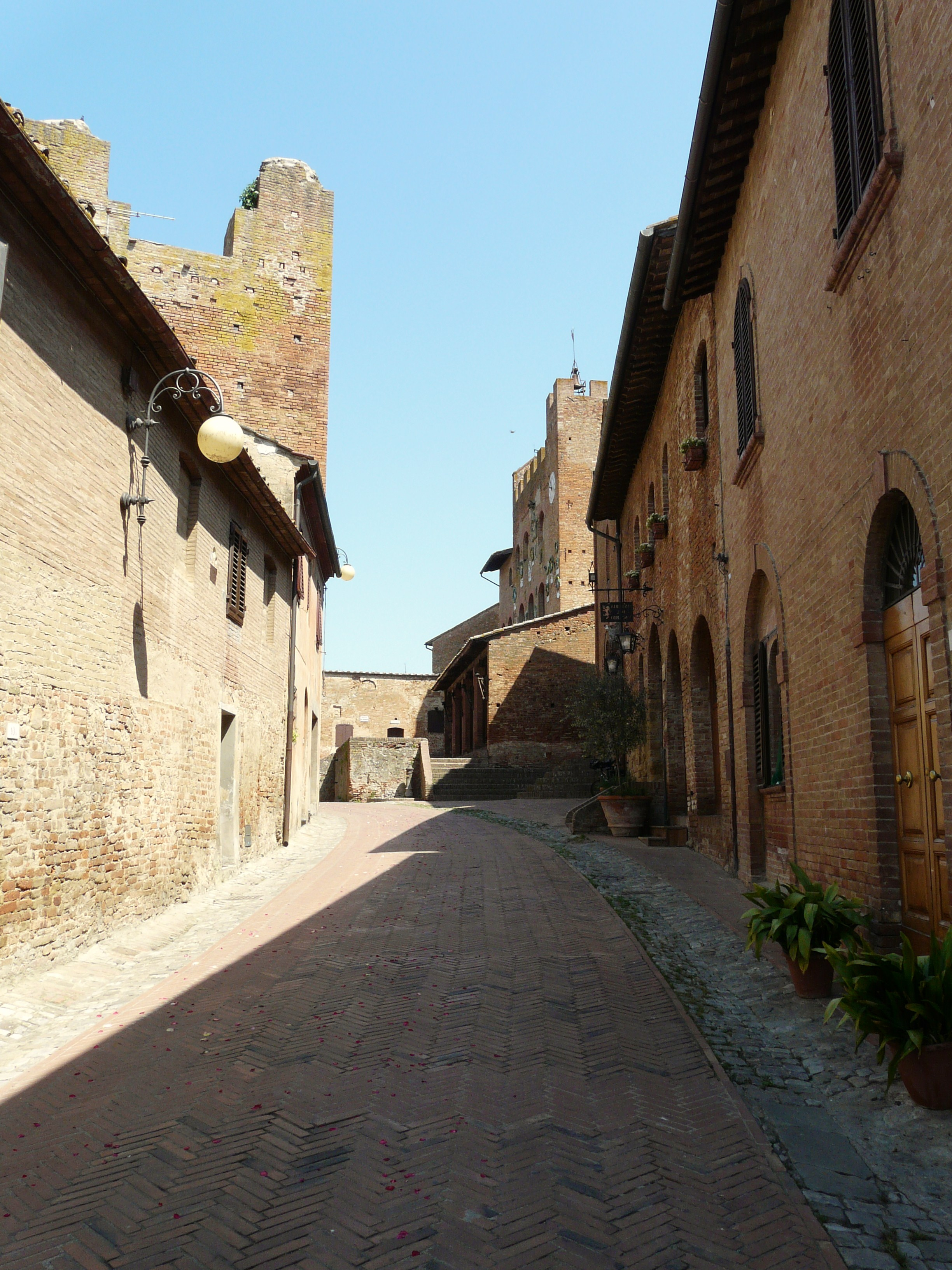 Certaldo Alto, Certaldo, Toscana, Italia